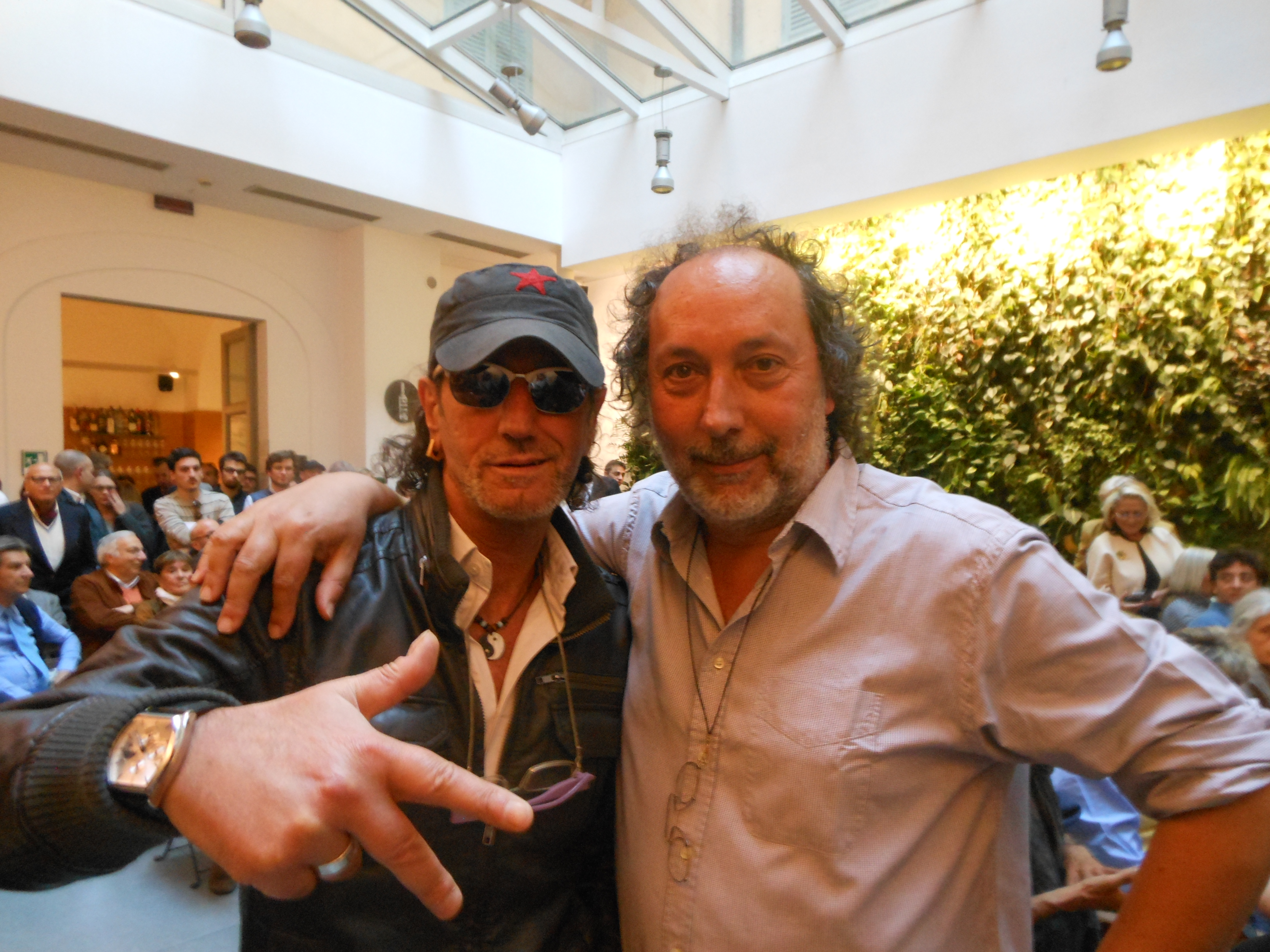 Massimo Marino e Fulvio Abbate durante la presentazione del libro Roma vista controvento di Fulvio Abbate - Foto di Miria Maiorani